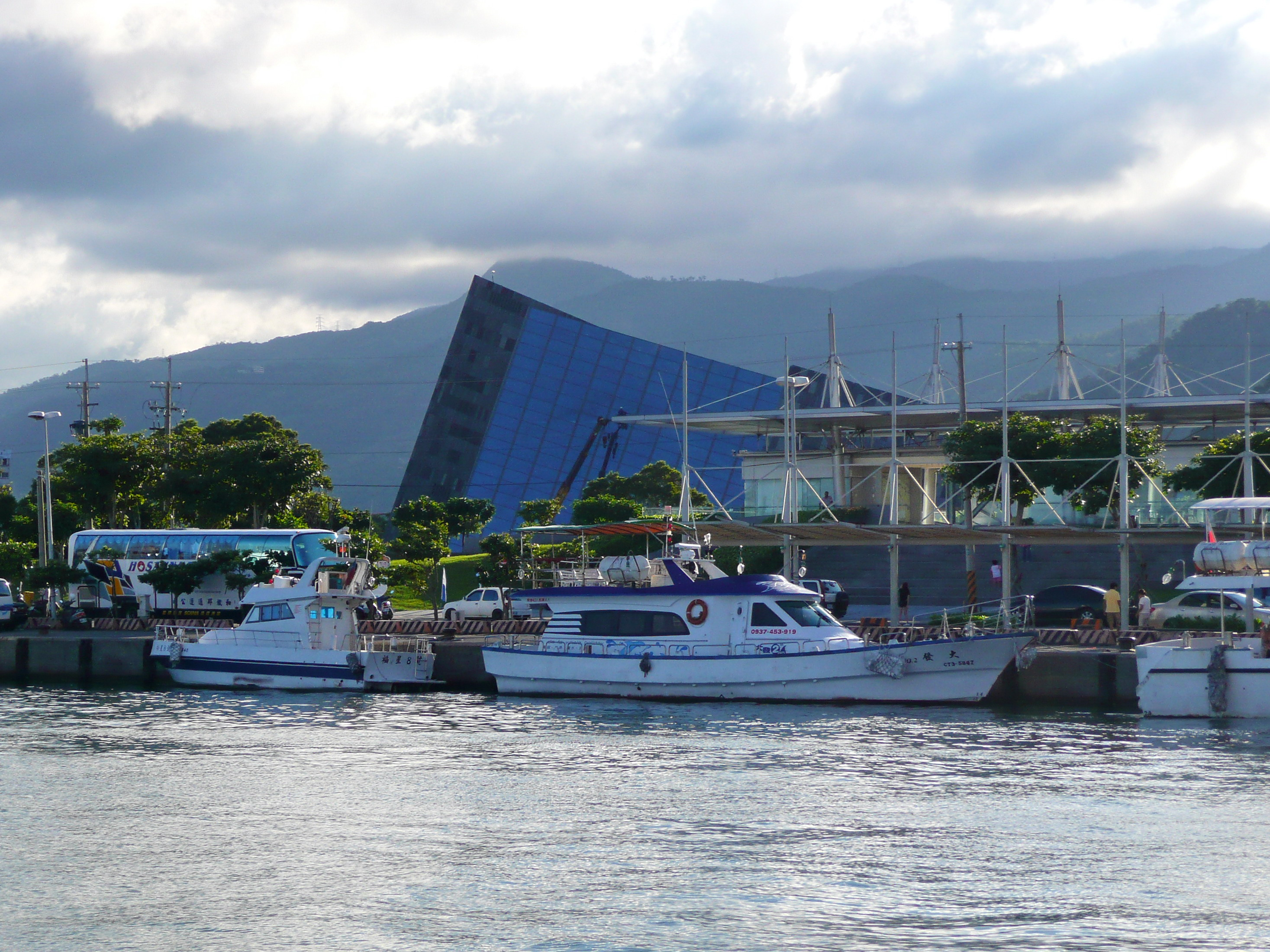 烏石港 Wushi Harbour